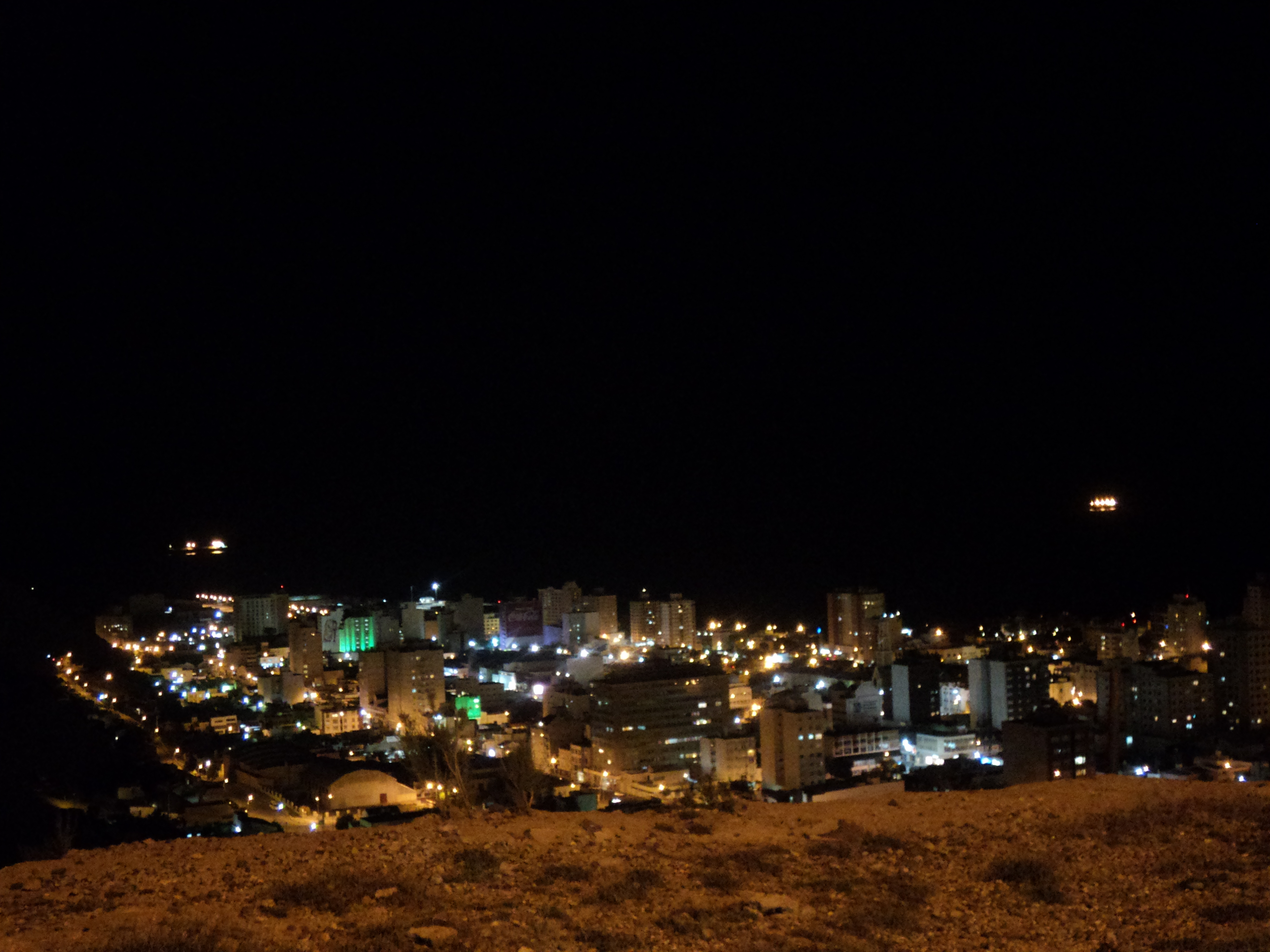 vista de comodoro desde el mirador de la avenida alsina